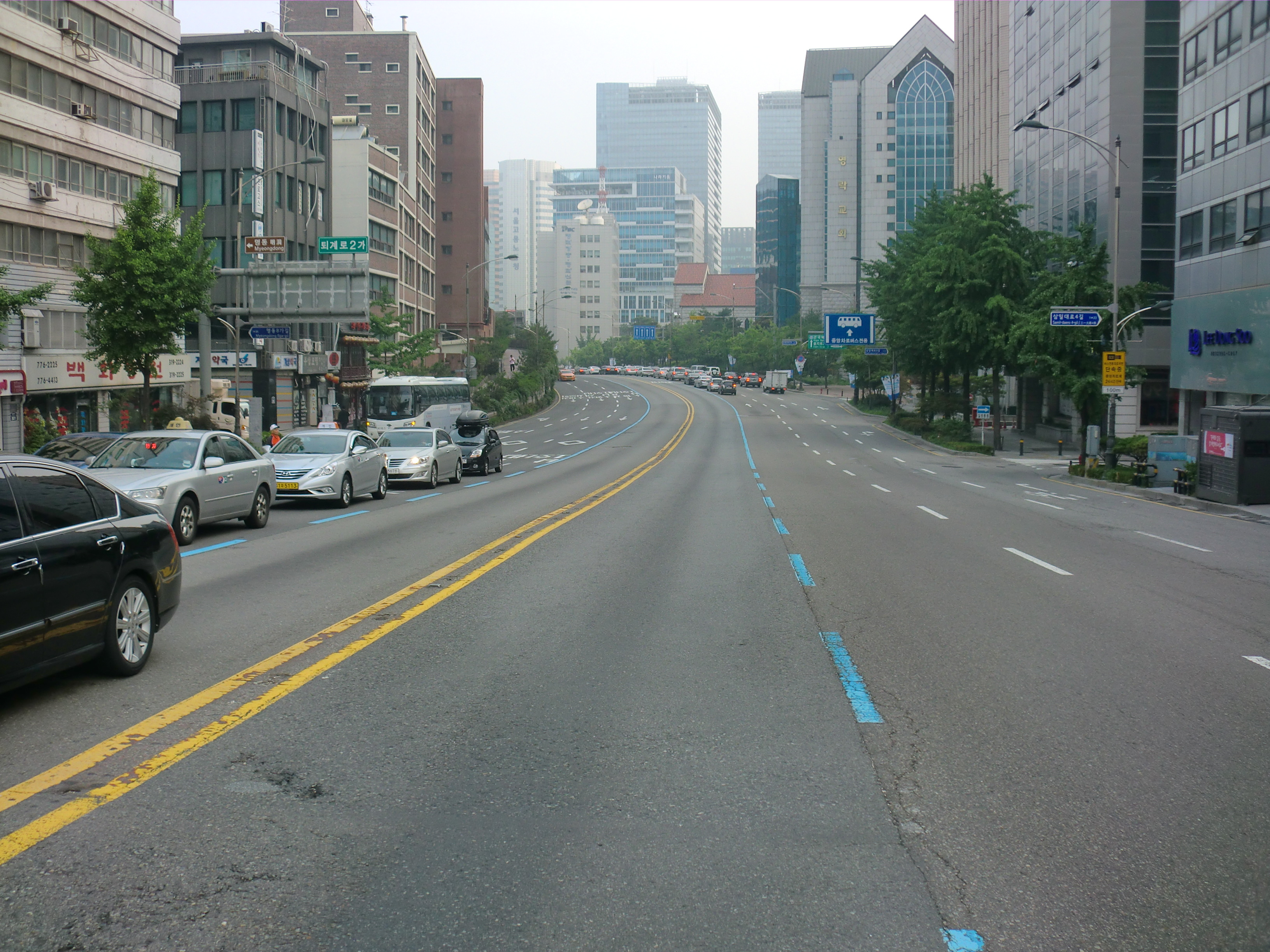 서울특별시 중구 삼일로에 있는 버스전용차로